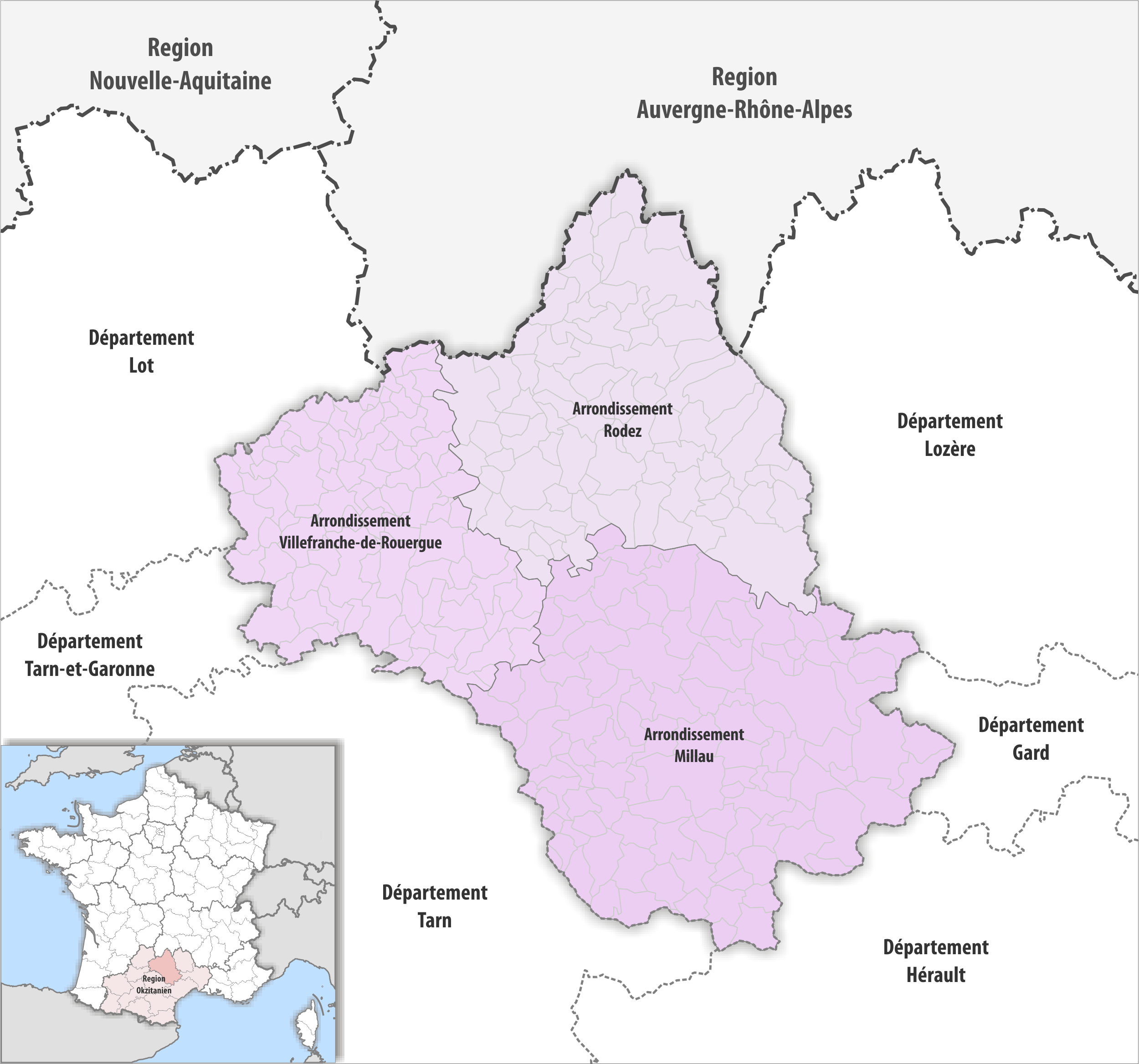 Gemeinden und Arrondissemente im Departement Aveyron